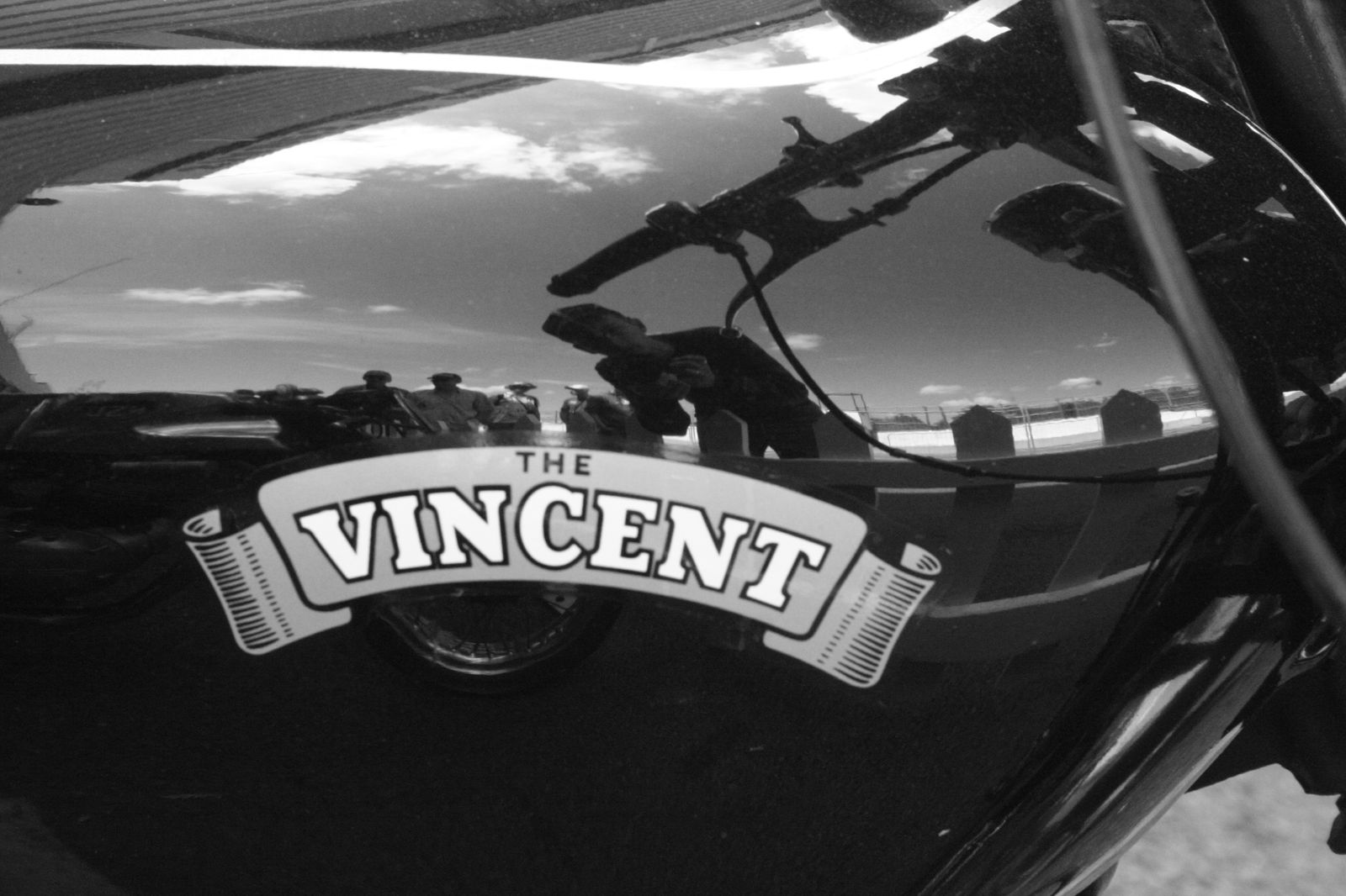 vincent